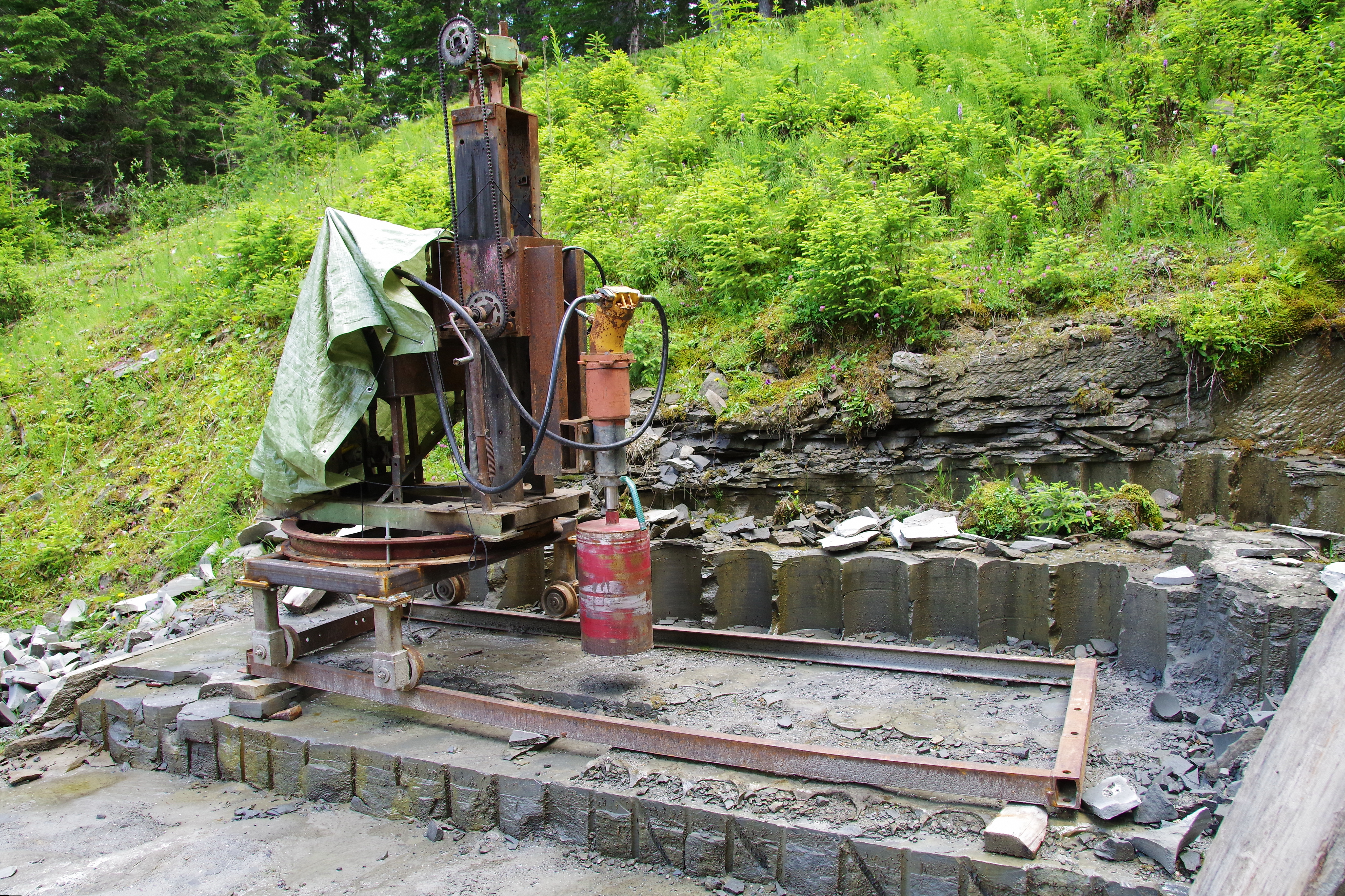 Gosauer Schleifsteinbruch, Abbaustelle Daxler